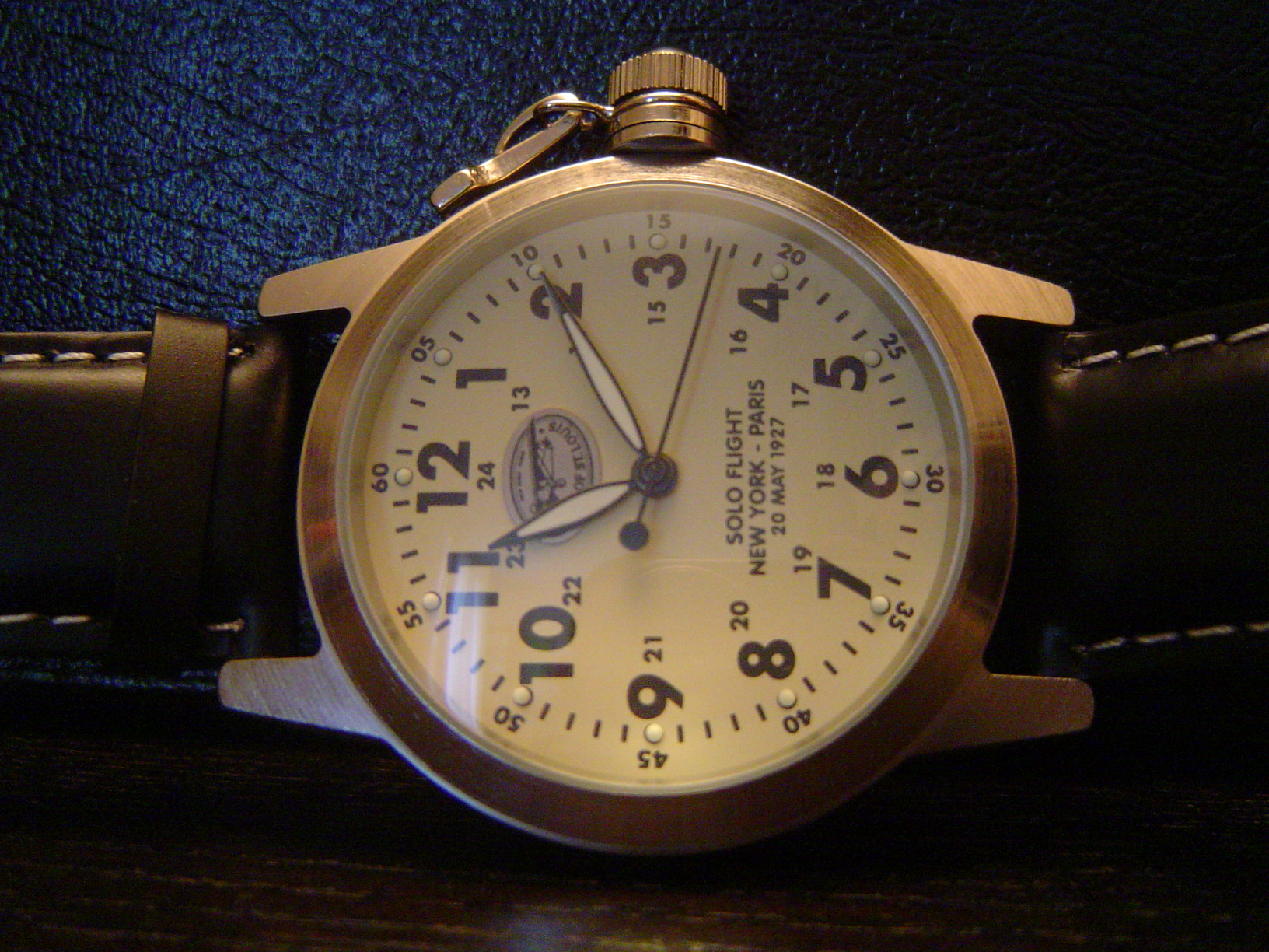 Montre Lip